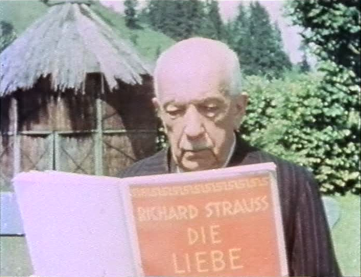 Richard Strauss mit dem Libretto der Oper Die Liebe der Danae (Garmisch-Partenkirchen, 1945)